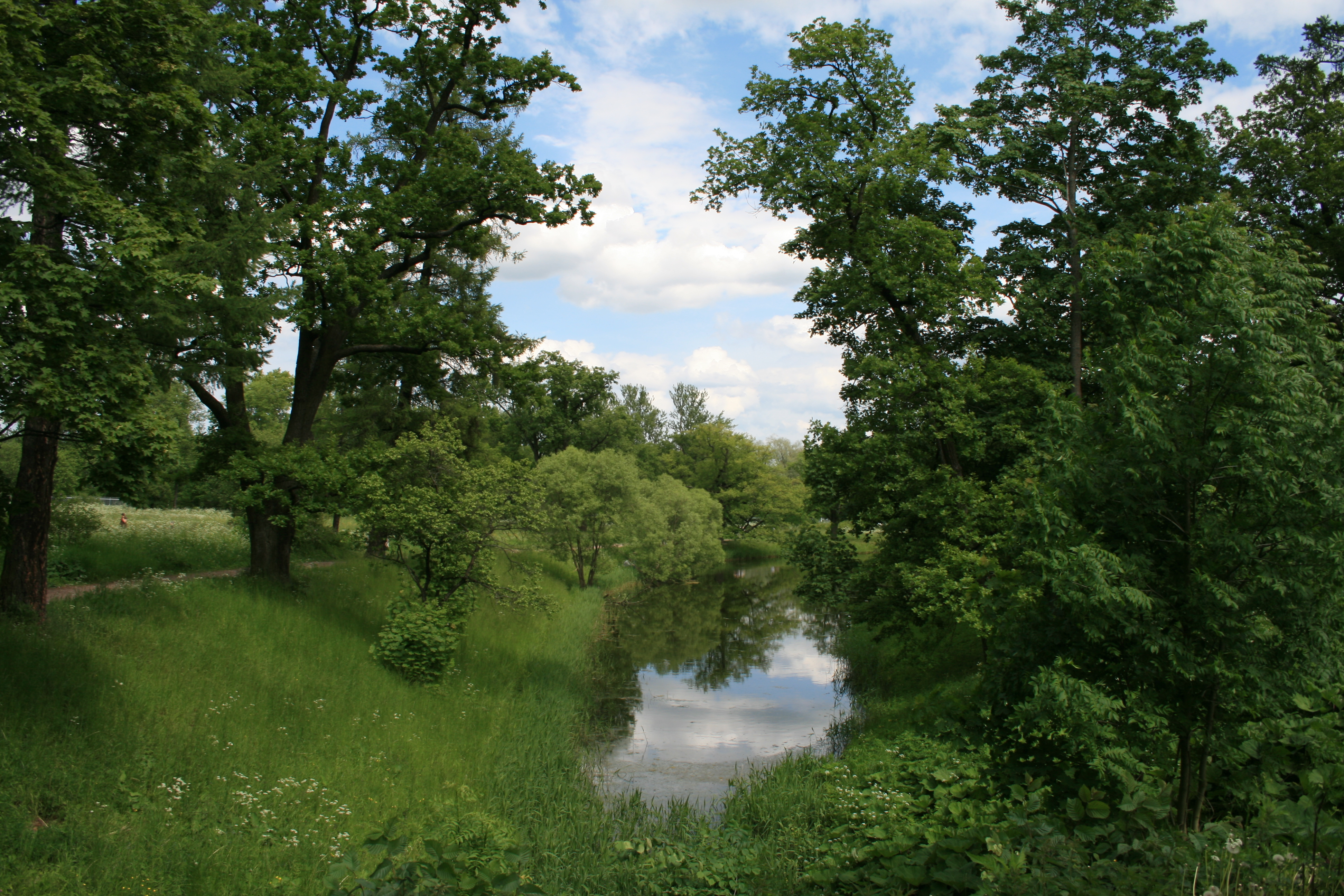 Нижний пруд в Александровском парке